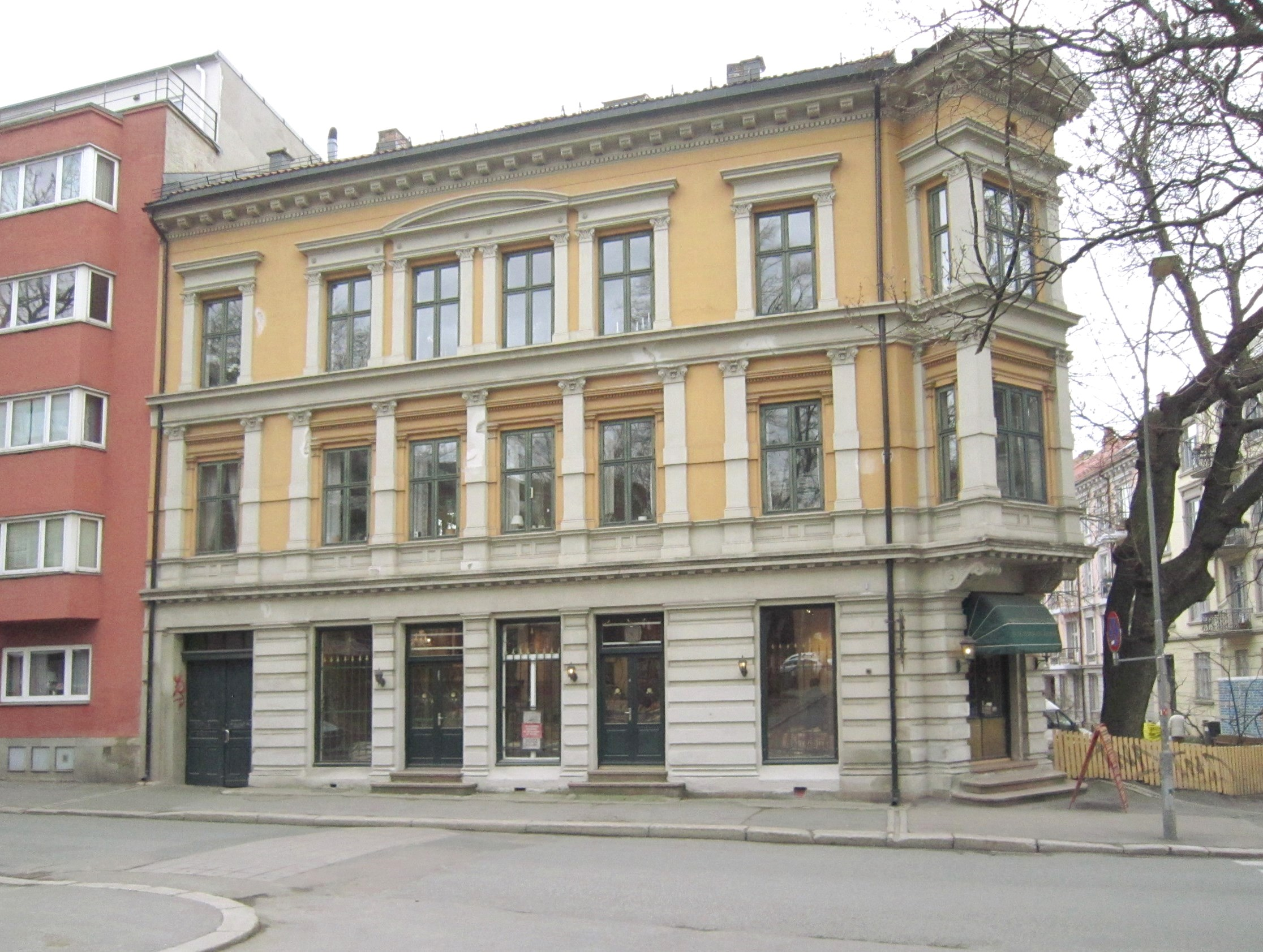 Majorstuveien 20 (arkitekt: Frithjof Aslesen, 1889)